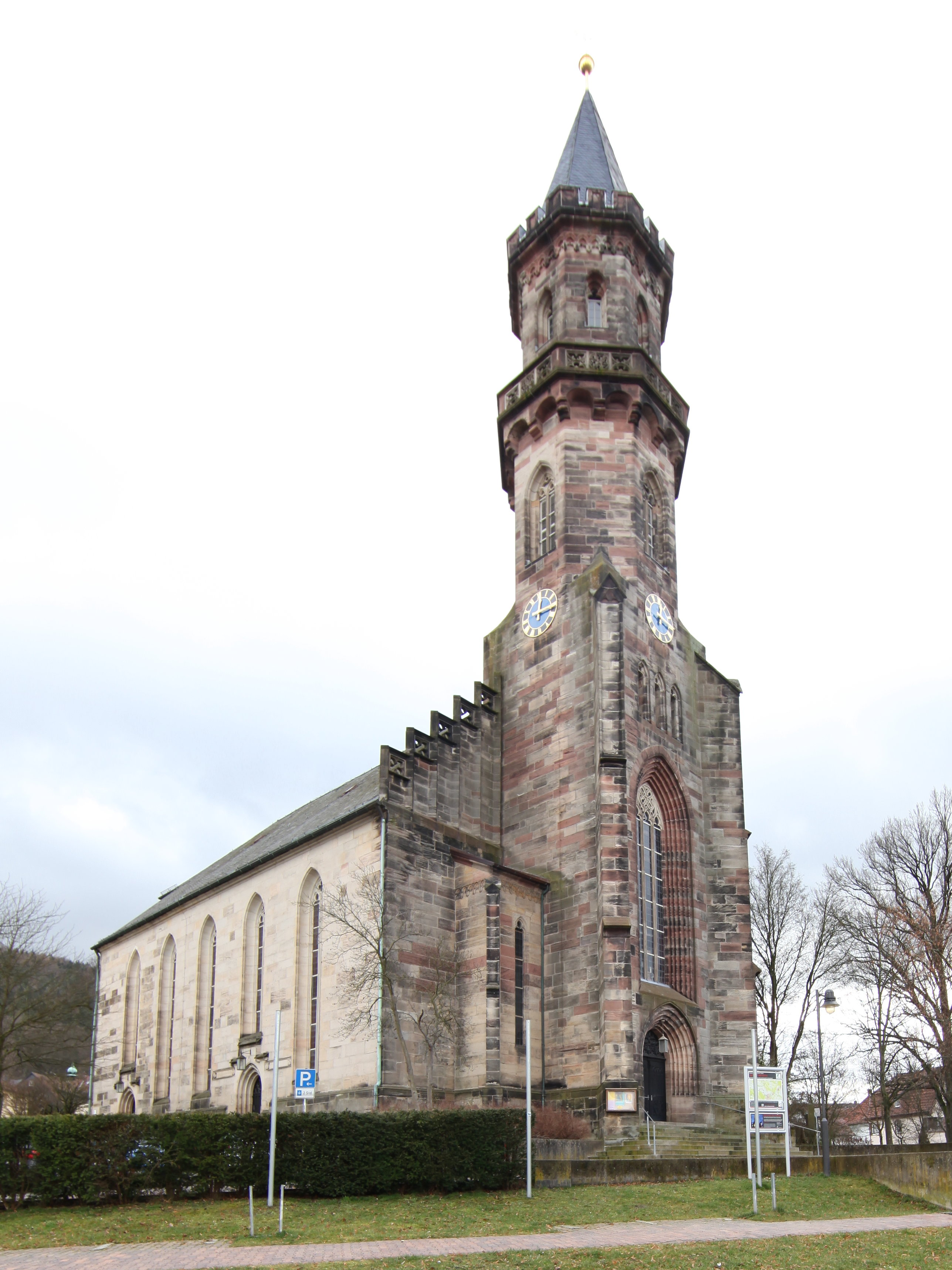 Neustadt-St.Georg